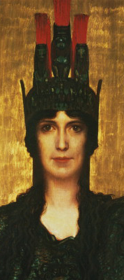 center cropped